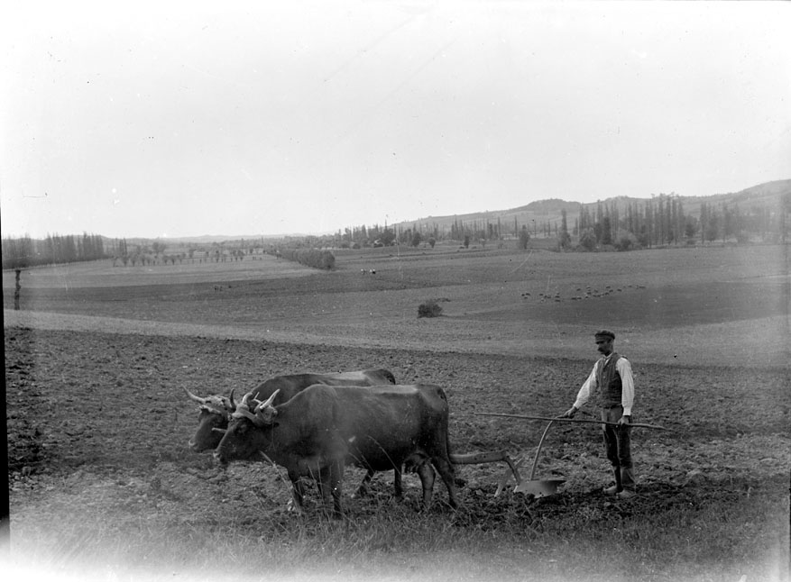 Fonds Trutat - Photographie ancienne Cote : PERB050_ Localisation : Fonds ancien (S 30) Original non communicable Titre : Agriculteur labourant un champ Auteur : Trutat, Eugène Rôle de l’auteur : Photographe Date de création : 1859-1910 [entre] Observations : Collection Antonin Perbosc. Mot(s)-clé(s) : -- Champ -- Agriculture -- Paysan -- Labour à bras -- Charrue -- Préparation du sol -- Boeuf -- Campagne -- 19e siècle, 2e moitié -- 20e siècle, 1e quart Médium : Photographies -- Noir et blanc -- Scènes animalières Bibliothèque de Toulouse. Domaine public